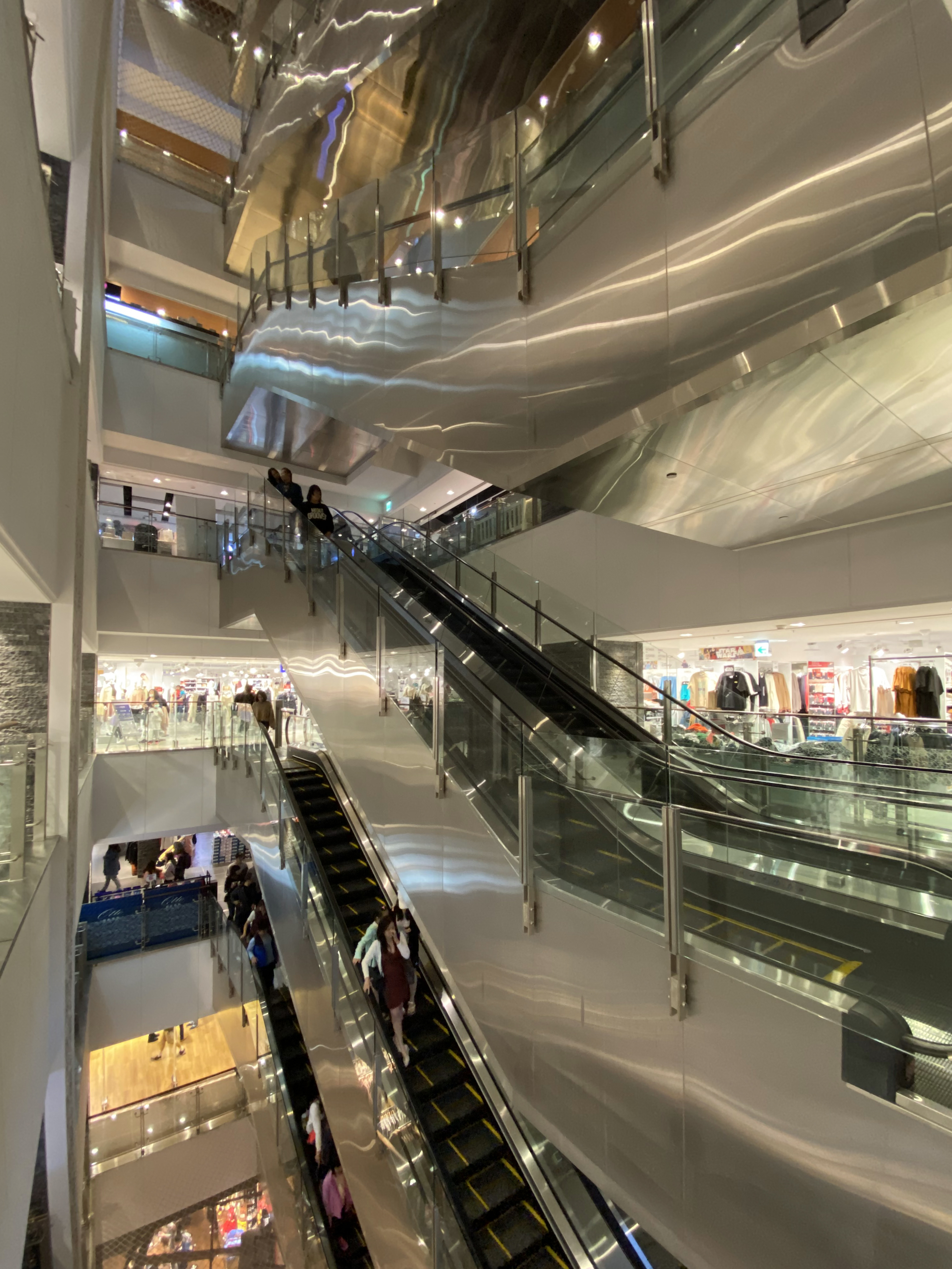 CITYLINK Nangang Block C Escalator Void